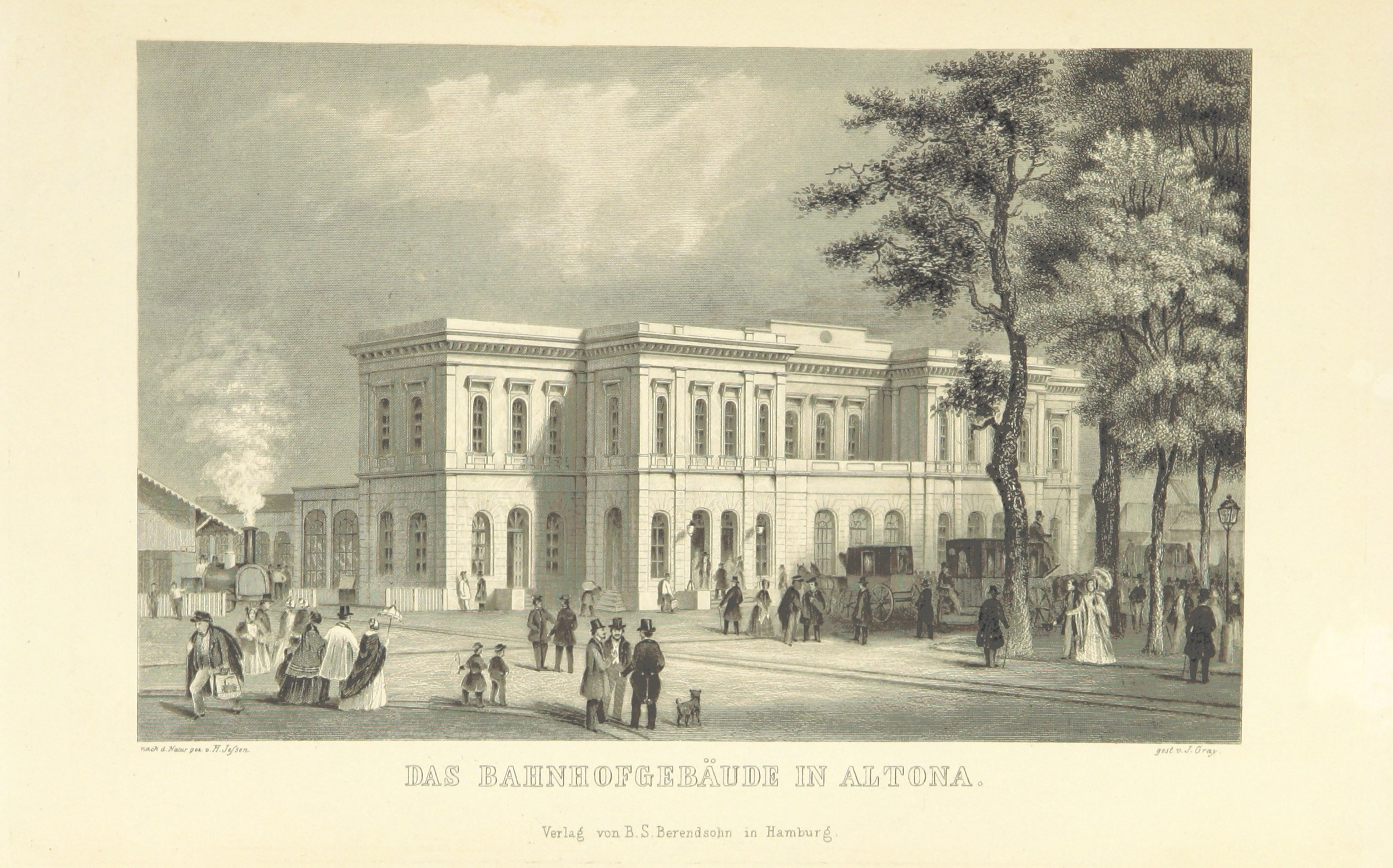 Hamburg und seine Umgebungen im 19. Jahrhundert. Eine Reihenfolge naturgetreuer, in Stahl gestochener Ansichten der Stadt und ihrer Umgebung (Nach der Natur gezeichnet von Carl Alexander Lill u. A.)., 1844